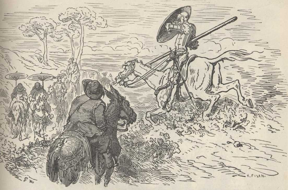 "Dom Quixote encontra dois beneditinos e um coche" (1863), iIustração por Gustave Doré para “Don Quixote“ de Miguel de Cervantes.